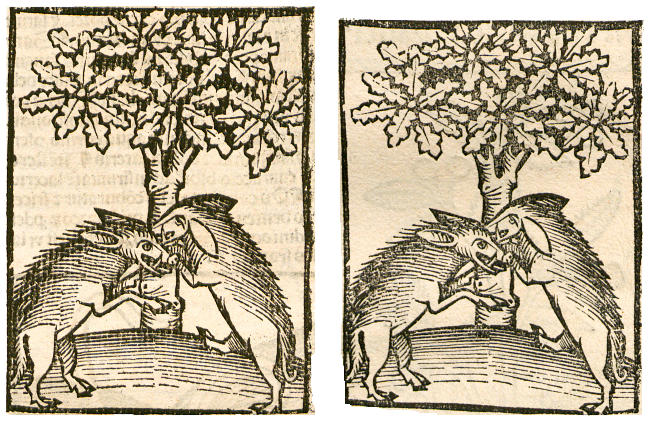 Abbildung vonː Schwin Blut (Schweineblut)